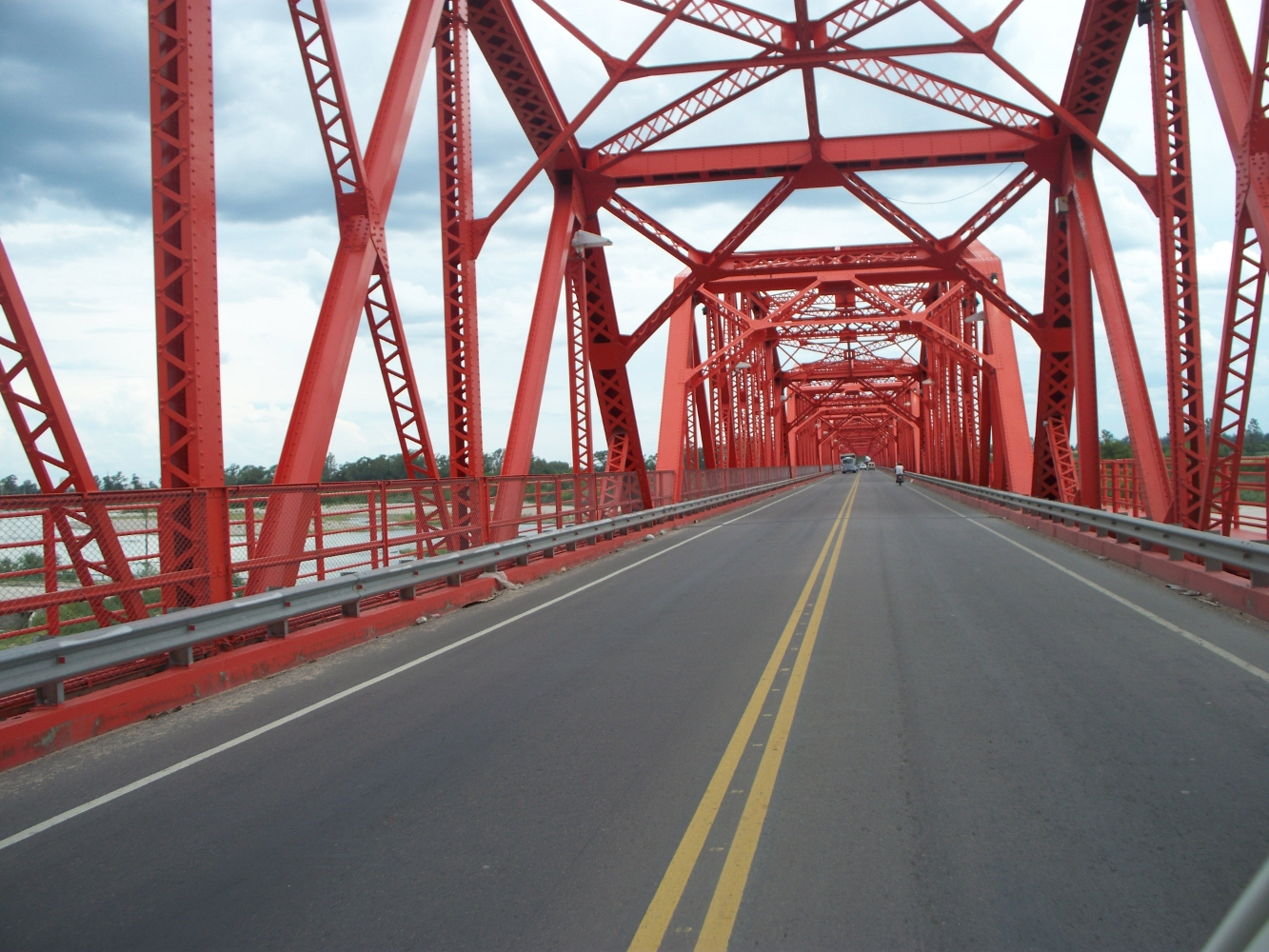 Puente carretero que une la Banda con Santiago del Estero.